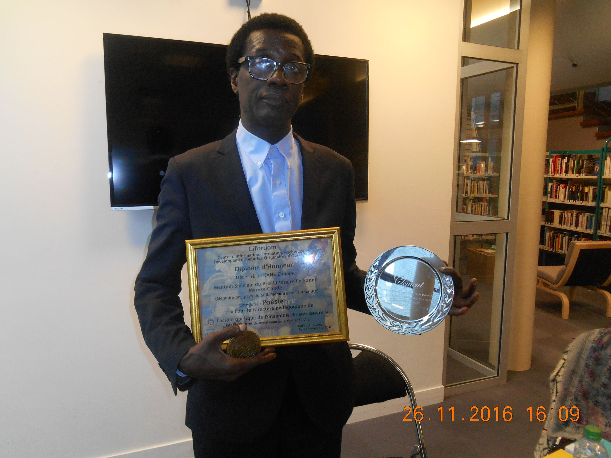 Amadou Elimane Kane recevant le Prix littéraire FETKANN ! Maryse Condé 2016 - Mémoire des Pays du Sud Mémoire de l'Humanité, catégorie Poésie, mention spéciale du jury pour le caractère pédagogique de l'action poétique de l'ensemble de l'oeuvre